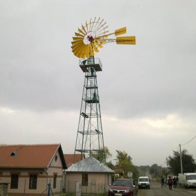 Vetro bunar izgrađena 1900.g renovirana 2011-2012.g sada je tehnološki muzej